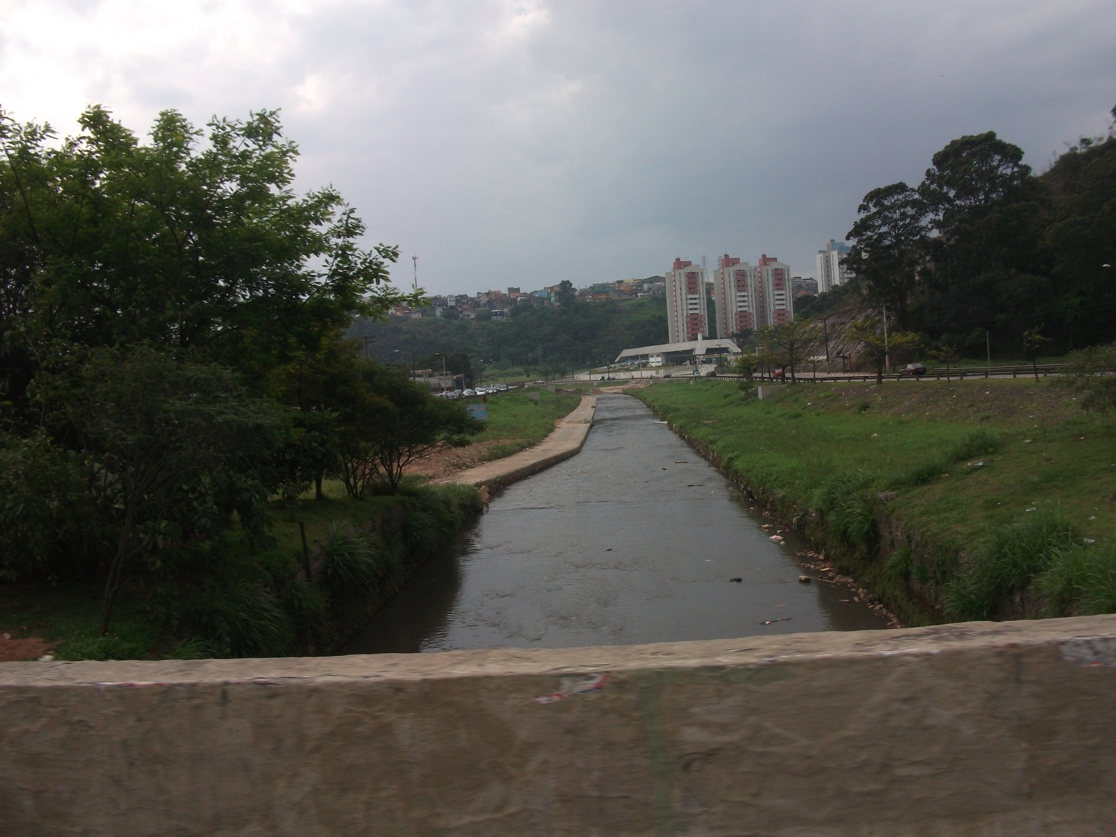 Rio Aricanduva na região do Parque do Carmo.